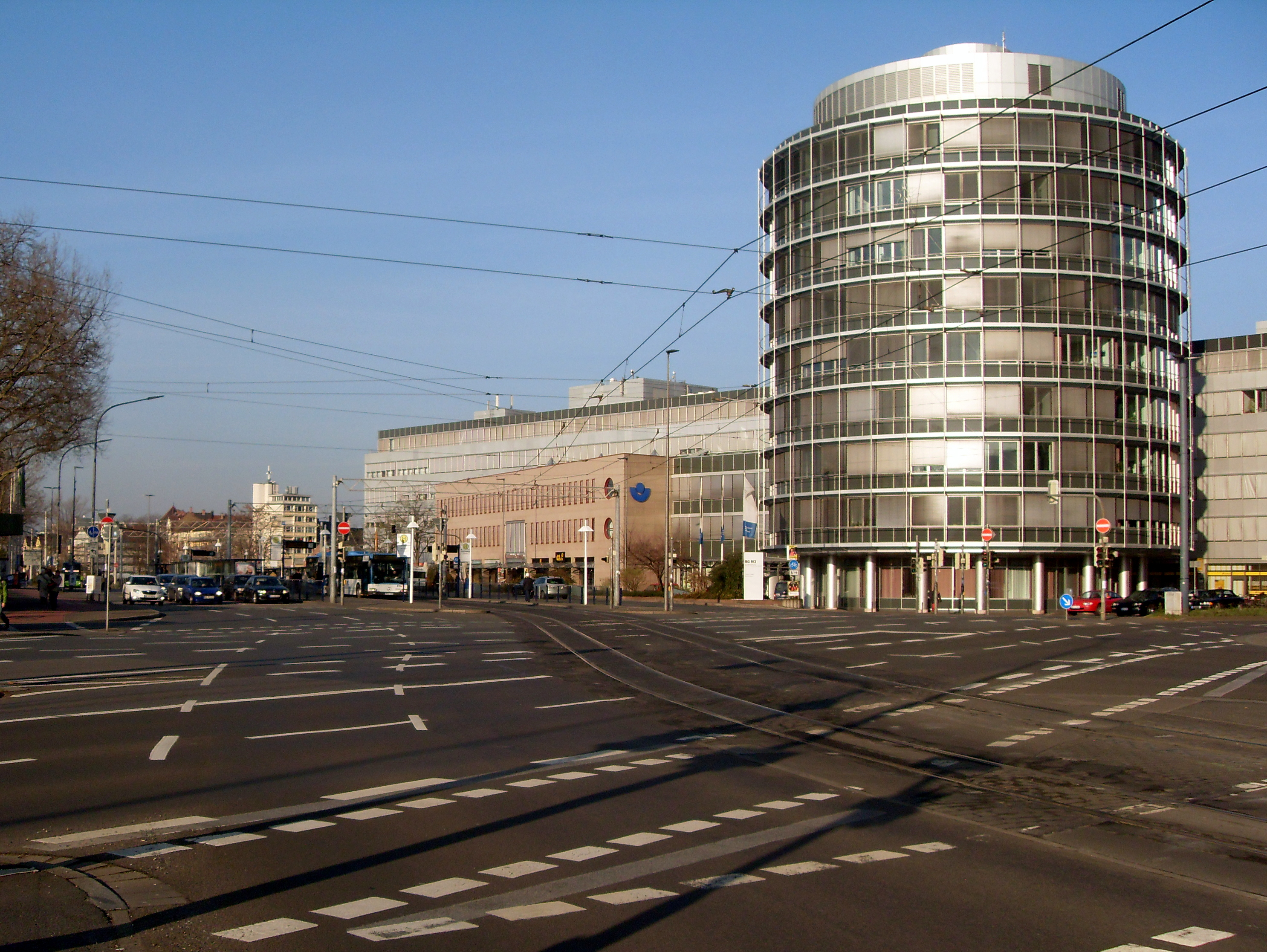 Kurfursten-Anlage in Heidelberg